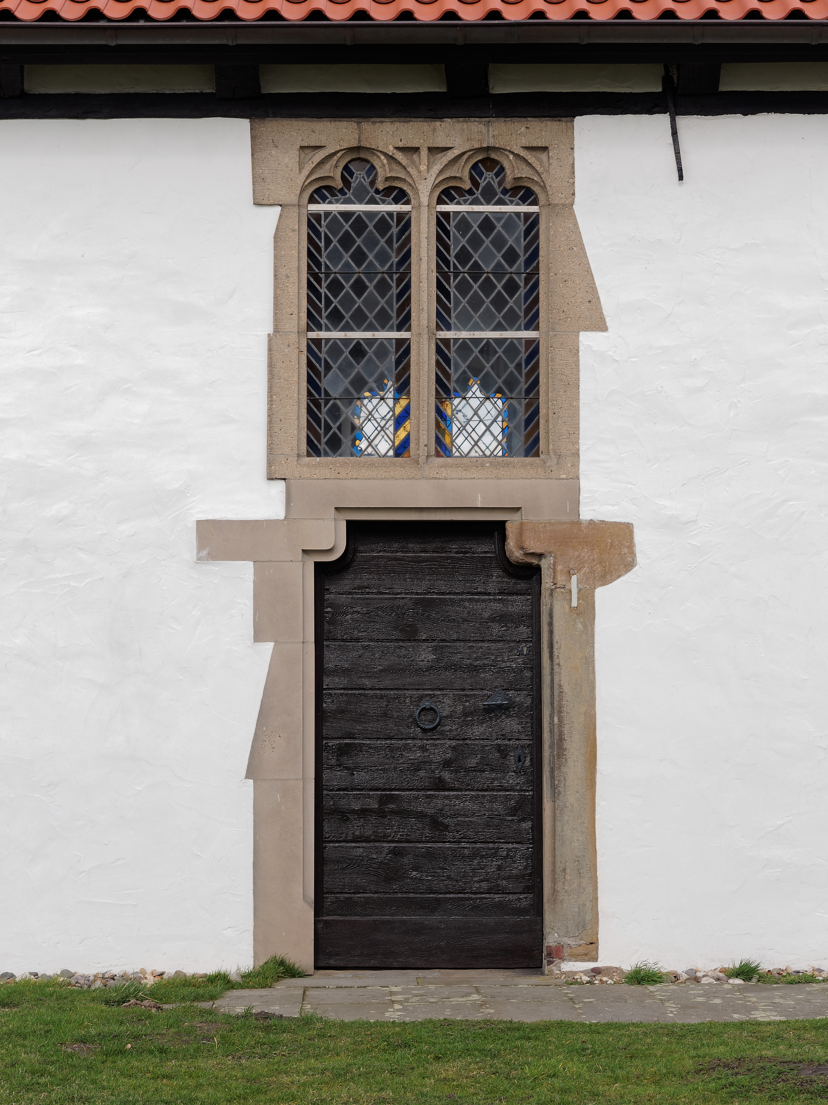 Die Kapelle St Laurentius in Waltrop-Leveringhausen mit dem südlichen Zugang, Denkmal aus der Zeit um 1070. Erstmalig 1343 urkundlich erwähnt. Turm 1886 erneuert.